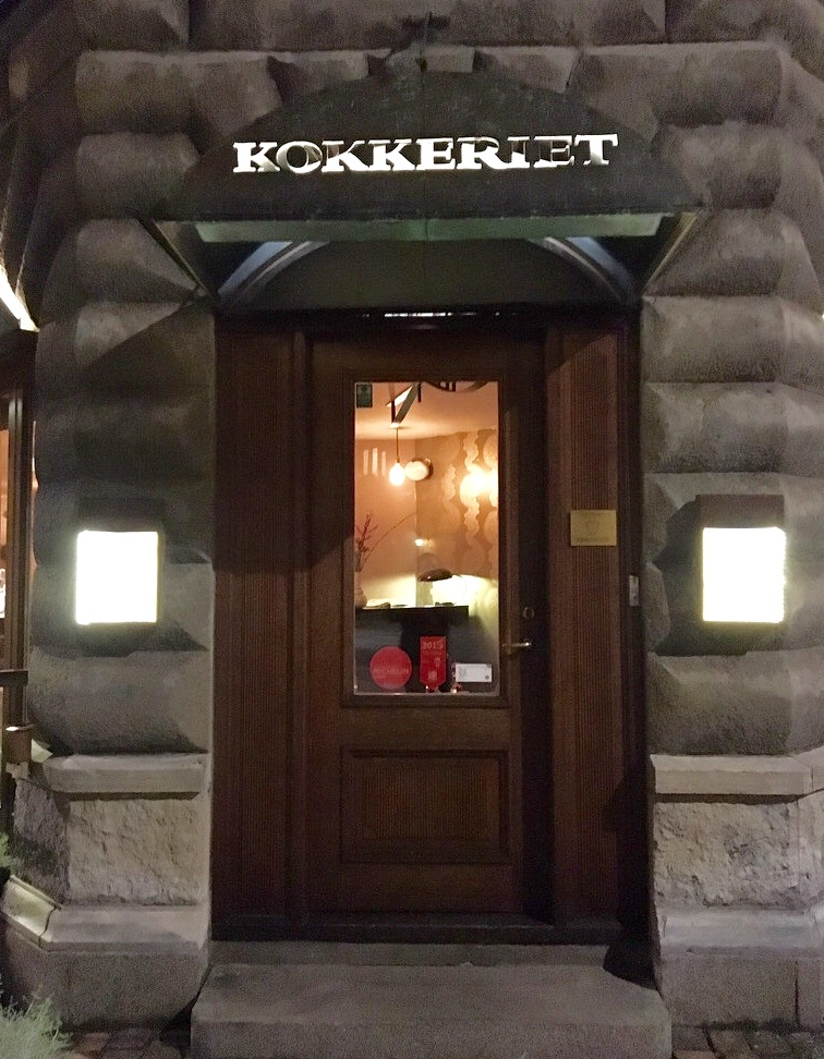 Indgangen til Restaurant Kokkeriet i 2015.